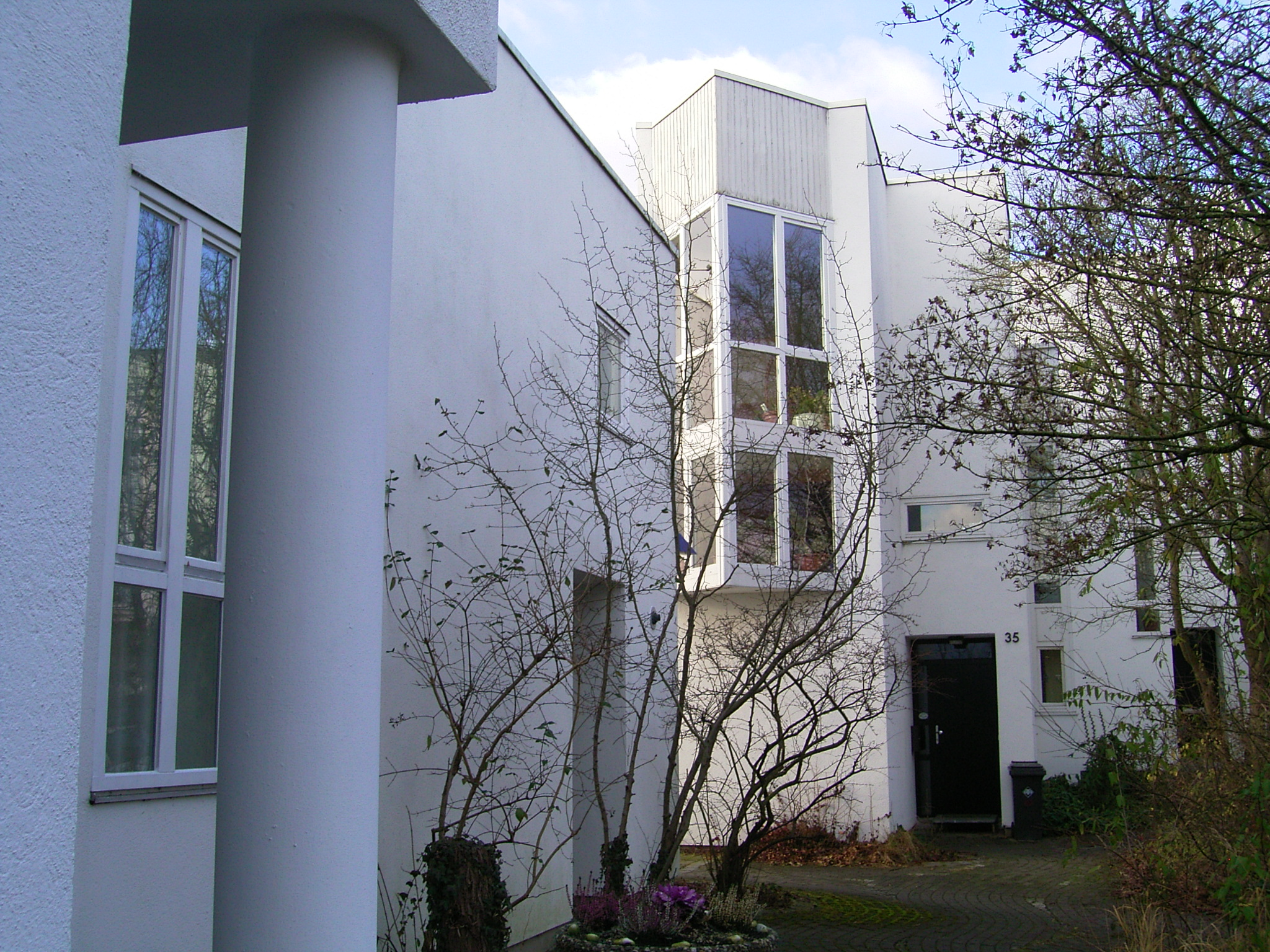 documenta urbana Wohngebäude in Kassel 1979-1982. Rainer